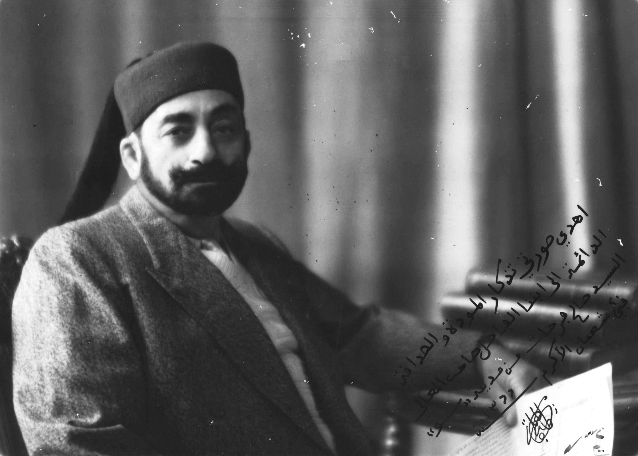 Photo dédicacée de Moncef Bey à Salah Farhat datée du 5 octobre 1947.